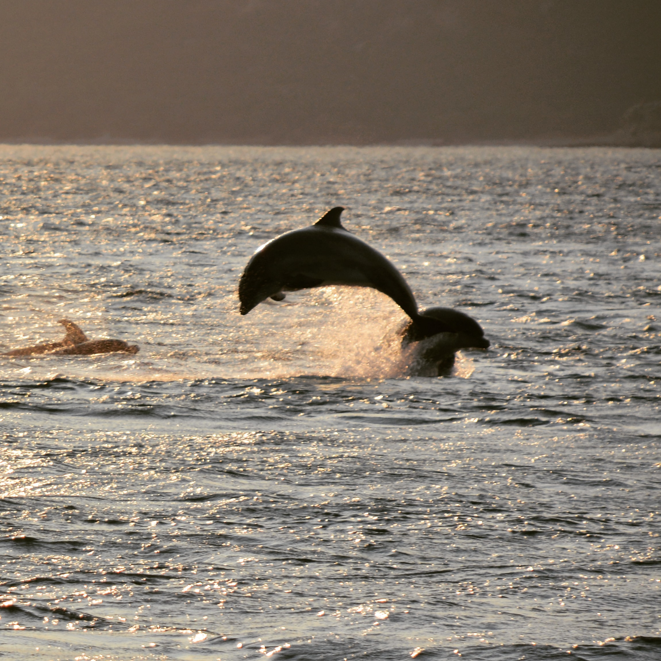 Grupo de delfines saltando en el estuario de Setubal.